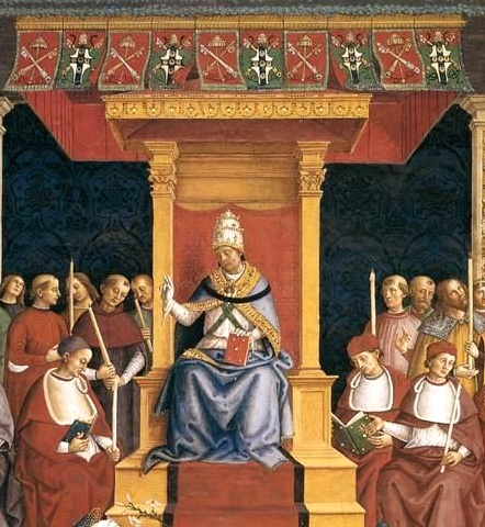 Papst Pius II. unter Baldachin mit seinem Wappen, Ausschnitt aus Pinturicchios Fresko "Kanonisation der Hl. Katharina von Siena", Dom zu Siena